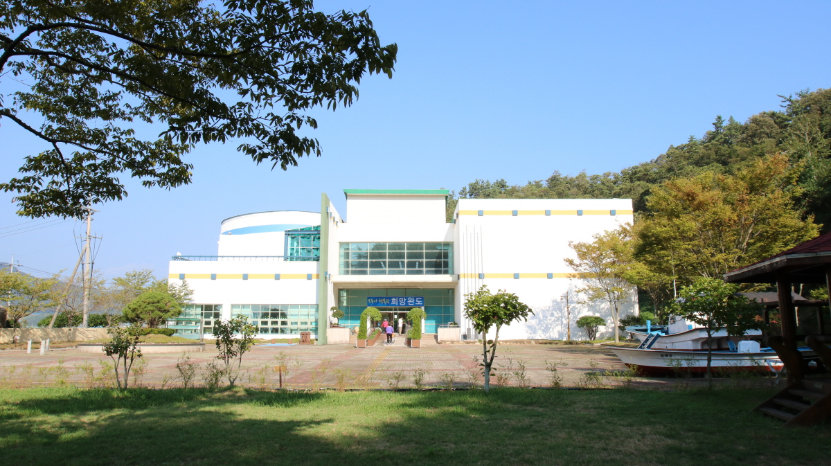 다양한 어류와 어촌의 생활상을 한눈에 볼 수 있는 대한민국 최대 규모의 어촌 박물관 겸 전시관